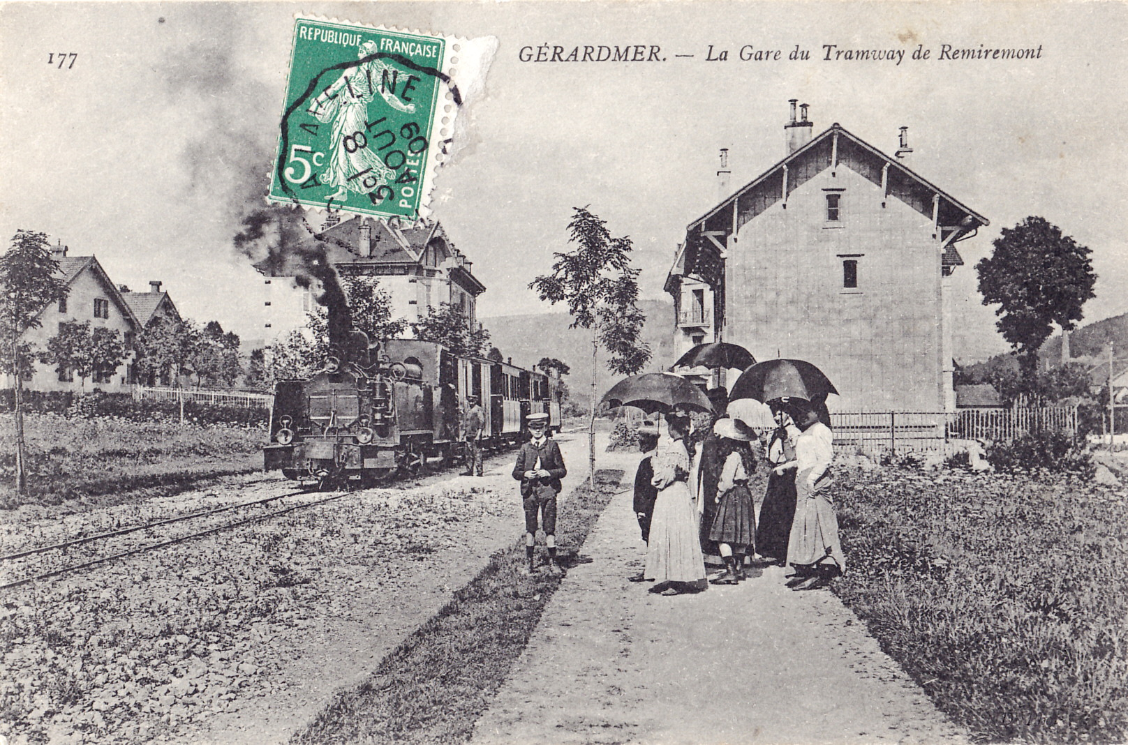 Carte postale ancienne sans mention d'éditeur, n°177 : GERARDMER - La gare du Tramway de Remiremont